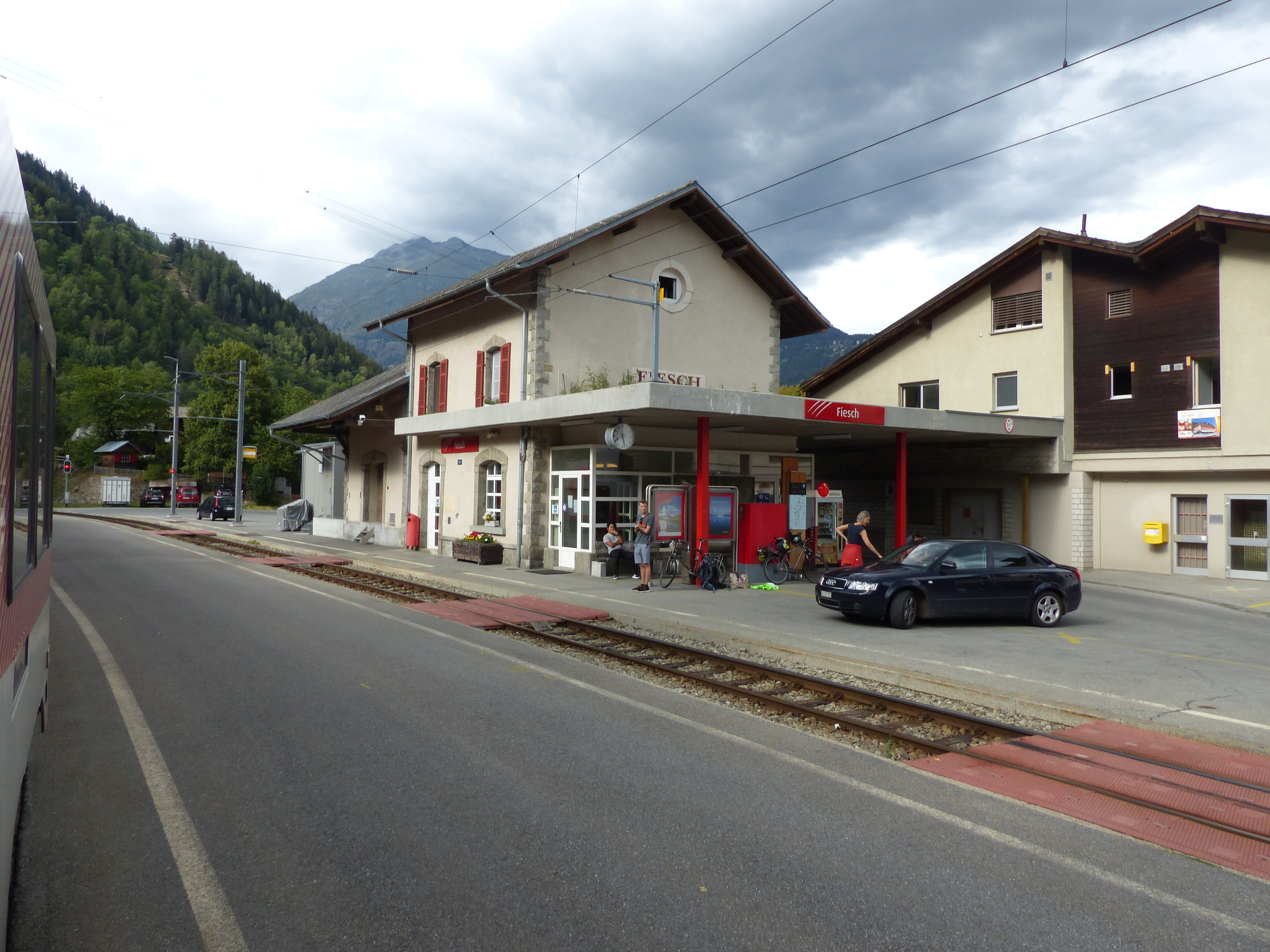 Bahnhof Fiesch, MGB